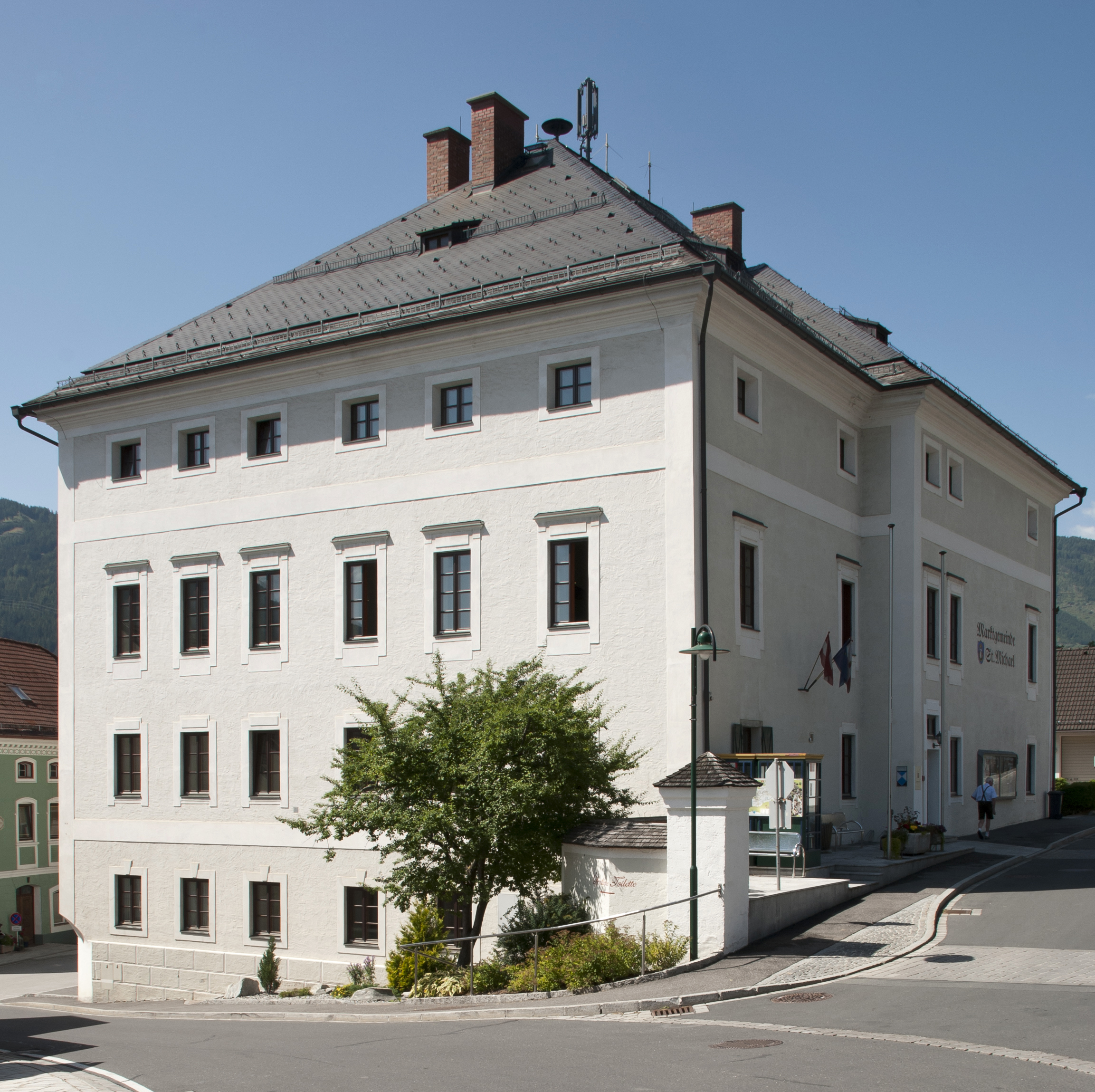 Gemeindeamt, ehem. Bezirksgericht Gerichtsstraße 1 / Marktplatz 1, 5582 St. Michael im Lungau